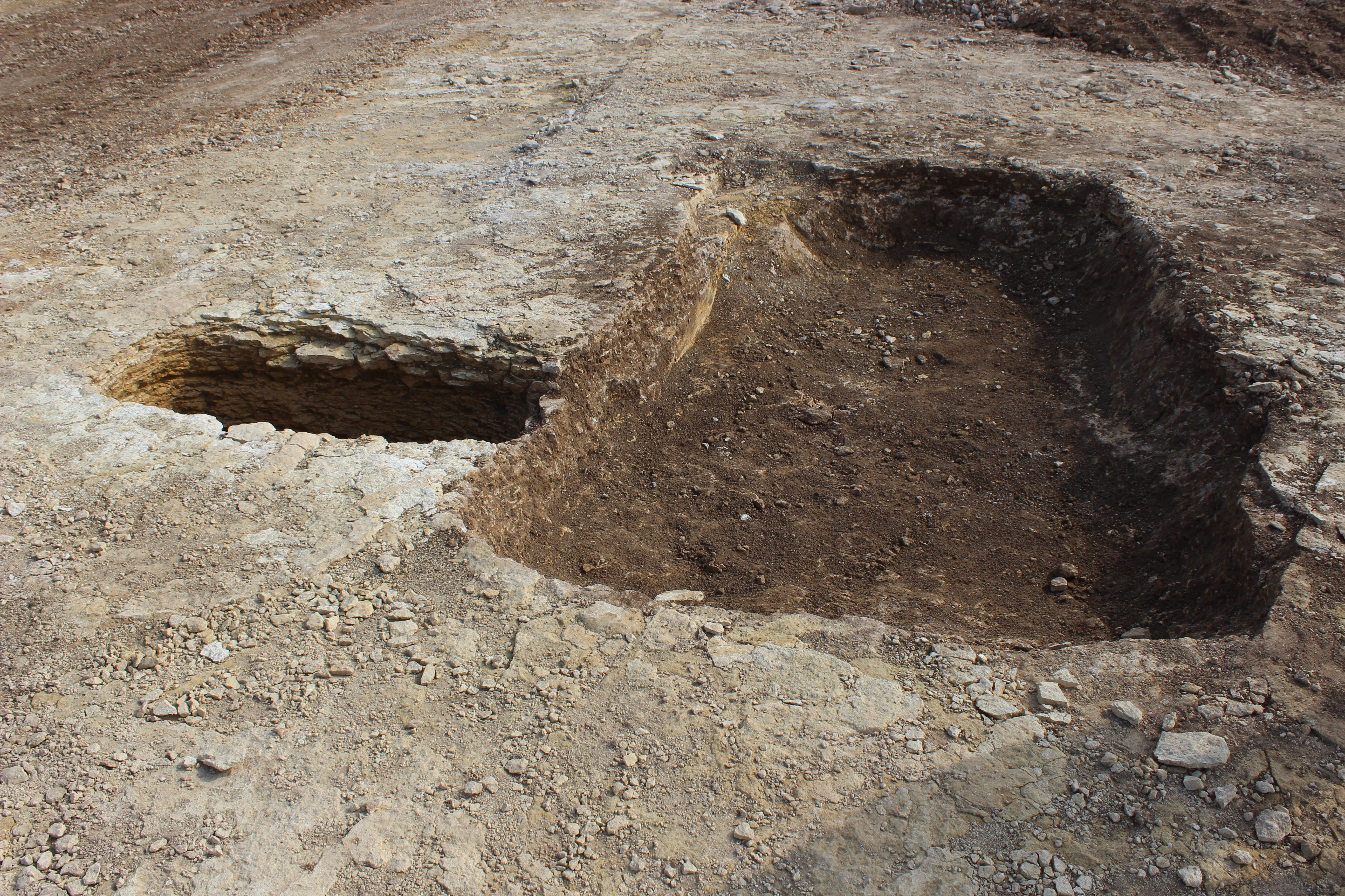 nécropole néolithique